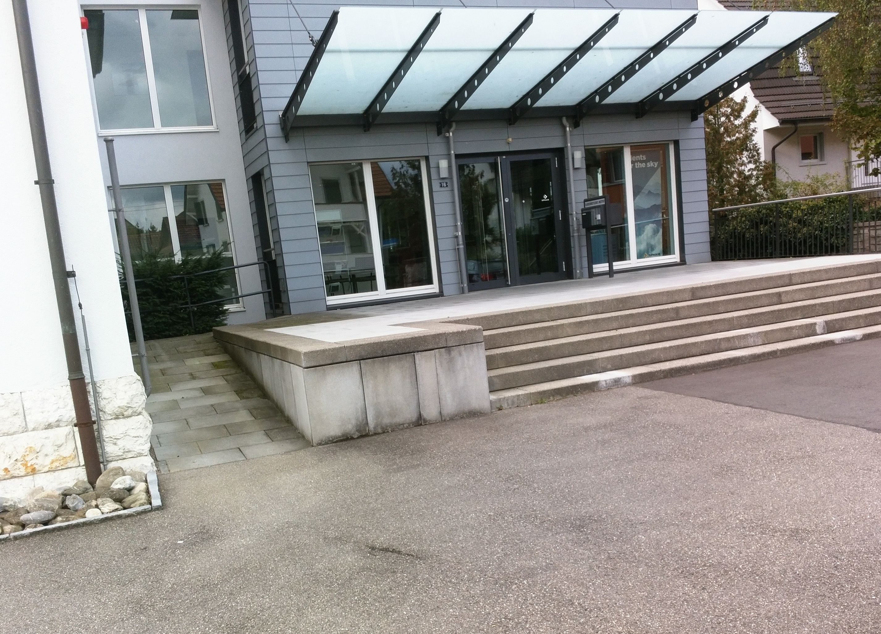 Eingang FAI